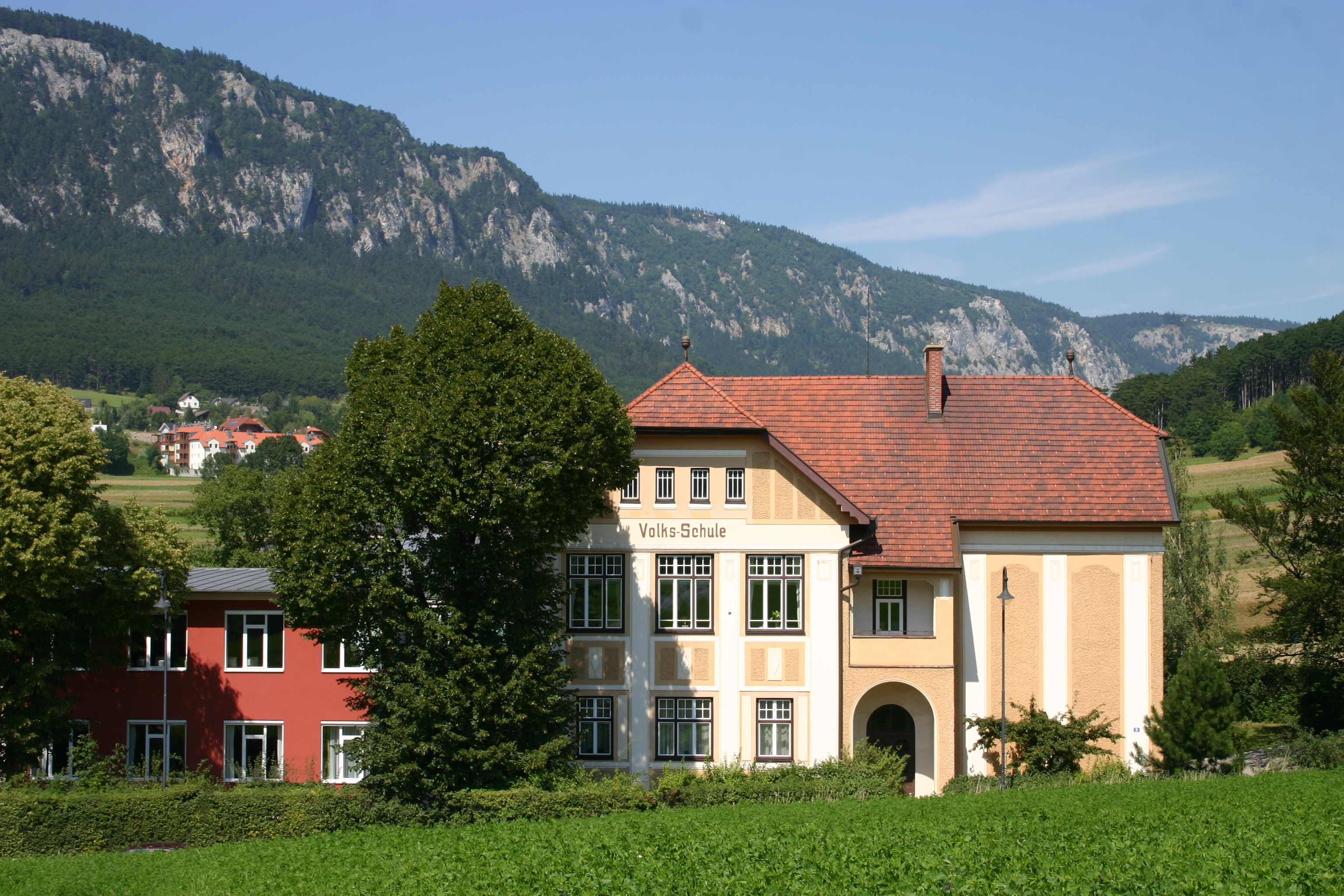 Höflein an der Hohen Wand historische Volksschule mit Zubau, im Hintergrund die Hohe Wand